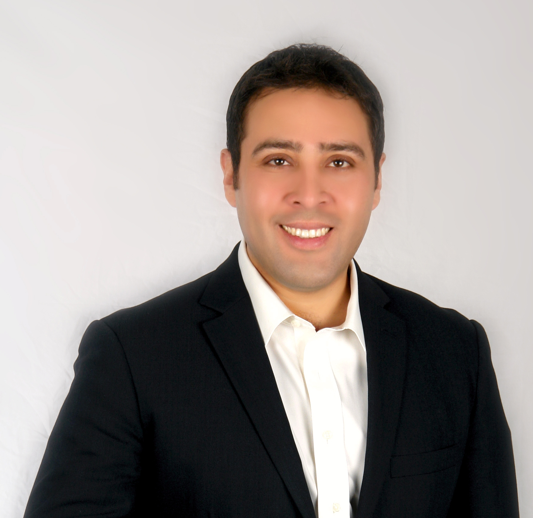 DIPUTADO FEDERAL DAVID CUAUHTÉMOC GALINDO DELGADO DISTRITO 02 SONORA NORTE